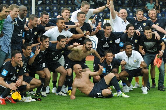 Металург (Донецьк) святкує 5 місце чемпіонату України сезону 2012-13, що дає їм право виступу в Лізі Європи